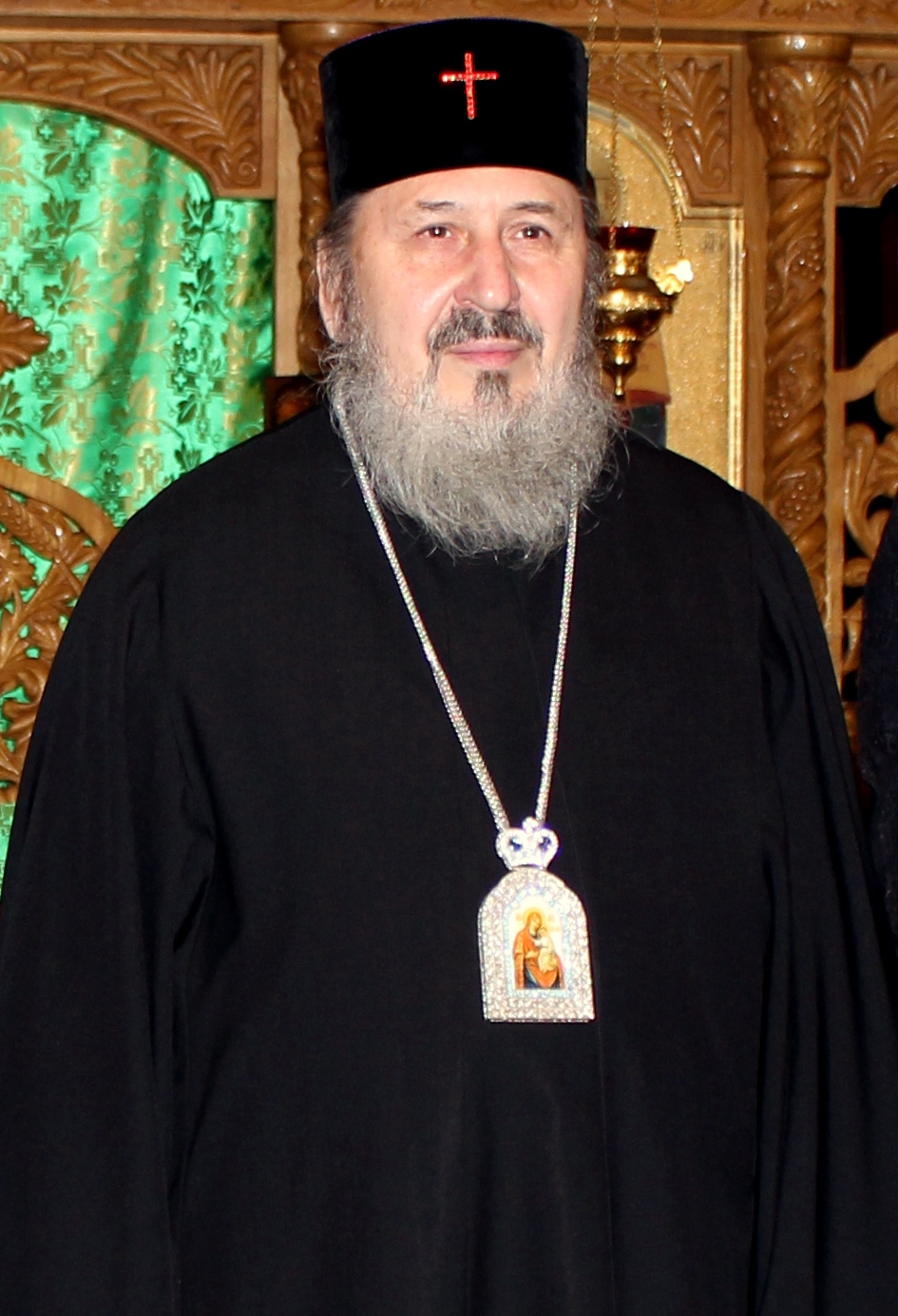 Crucea Mitrolopoliei Basarabiei